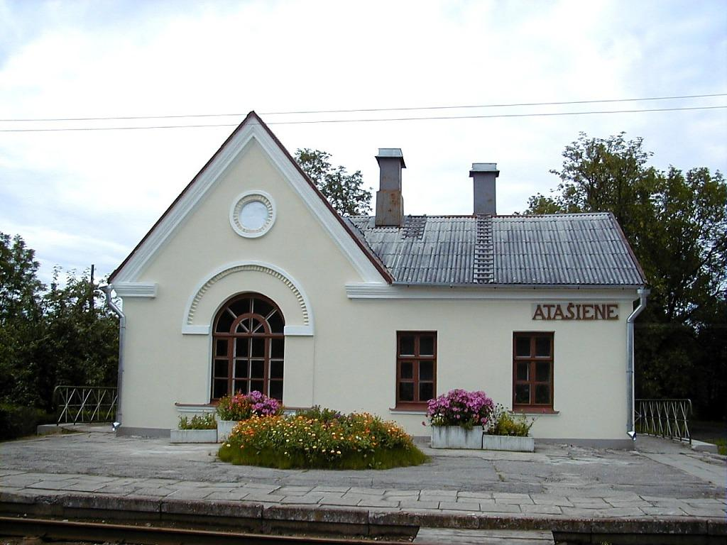 Atašienes stacija 2000-07-28